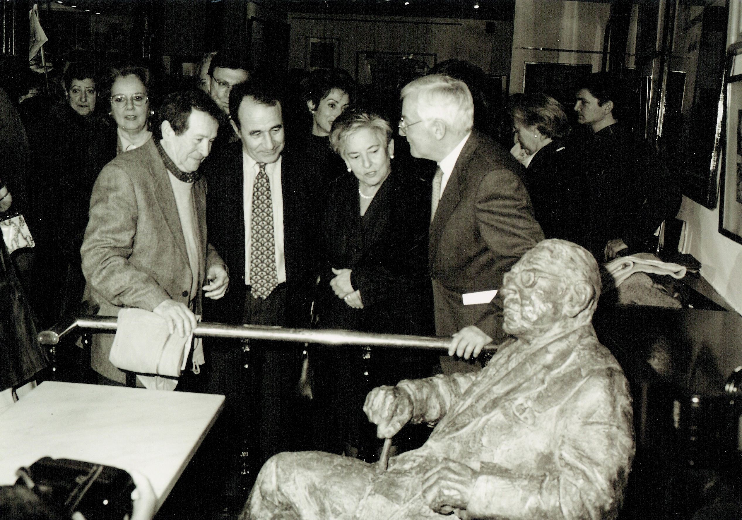 Acto Homenaje póstumo a Gonzalo Torrente Ballester, en el Café Novelty de la Plaza Mayor de Salamanca. Presentación de la escultura en su homenaje realizada por el escultor Fernando Mayoral. En la foto se puede ver con chaqueta clara al escultor, a su derecha al escritor gallego Carlos Casares, que precede a la viuda del escritor, doña María Fernanda Sánchez-Guisande Caamaño, y junto a la estatua al presidente de la RAE, Víctor García de la Concha.